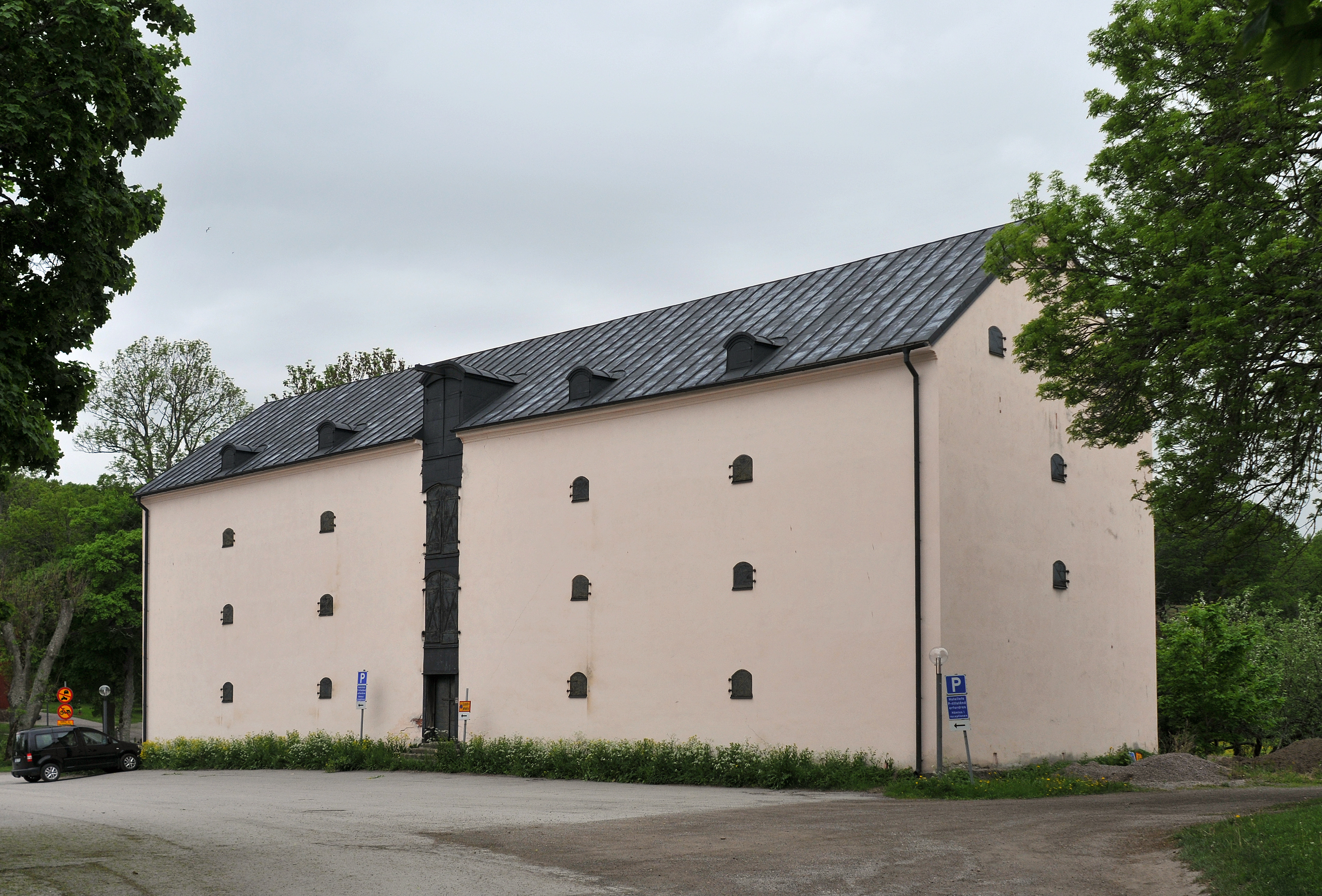 Gripsholm Kronomagasinet i Mariefred.